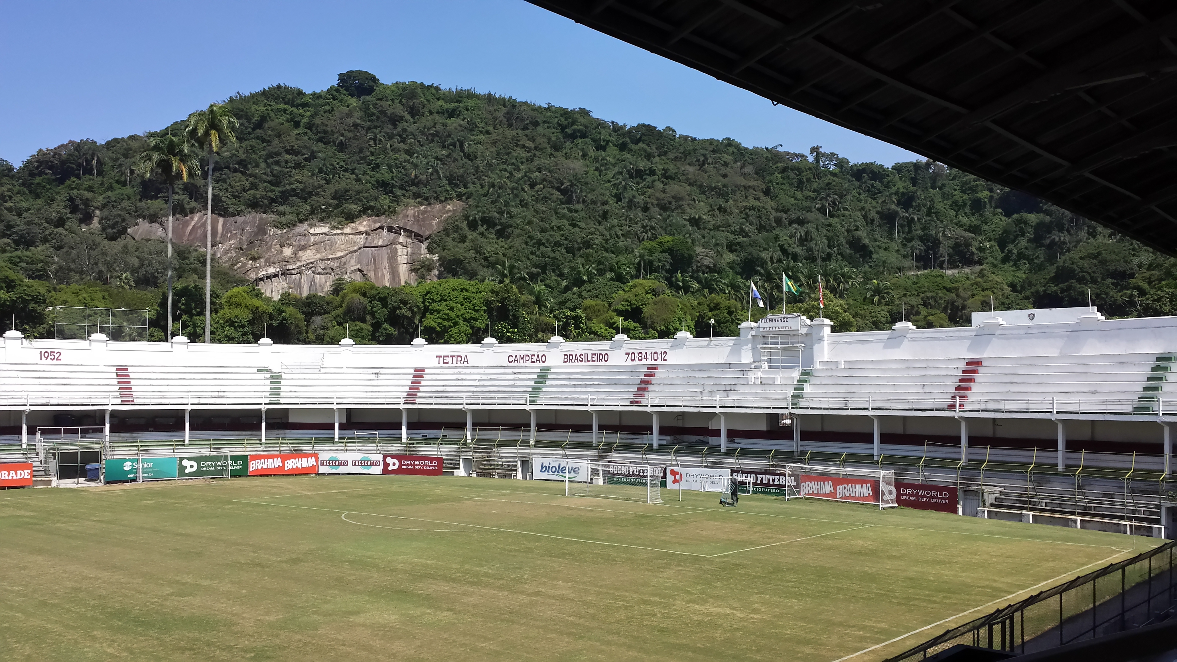 Estádio de Laranjeiras em 10 de abril de 2016.